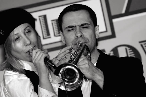 Солистка группы Татьяна Литвиненко и Александр Дитковский